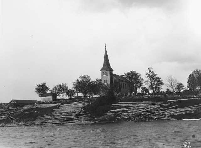 Aremark kirke og Aremarksjøen